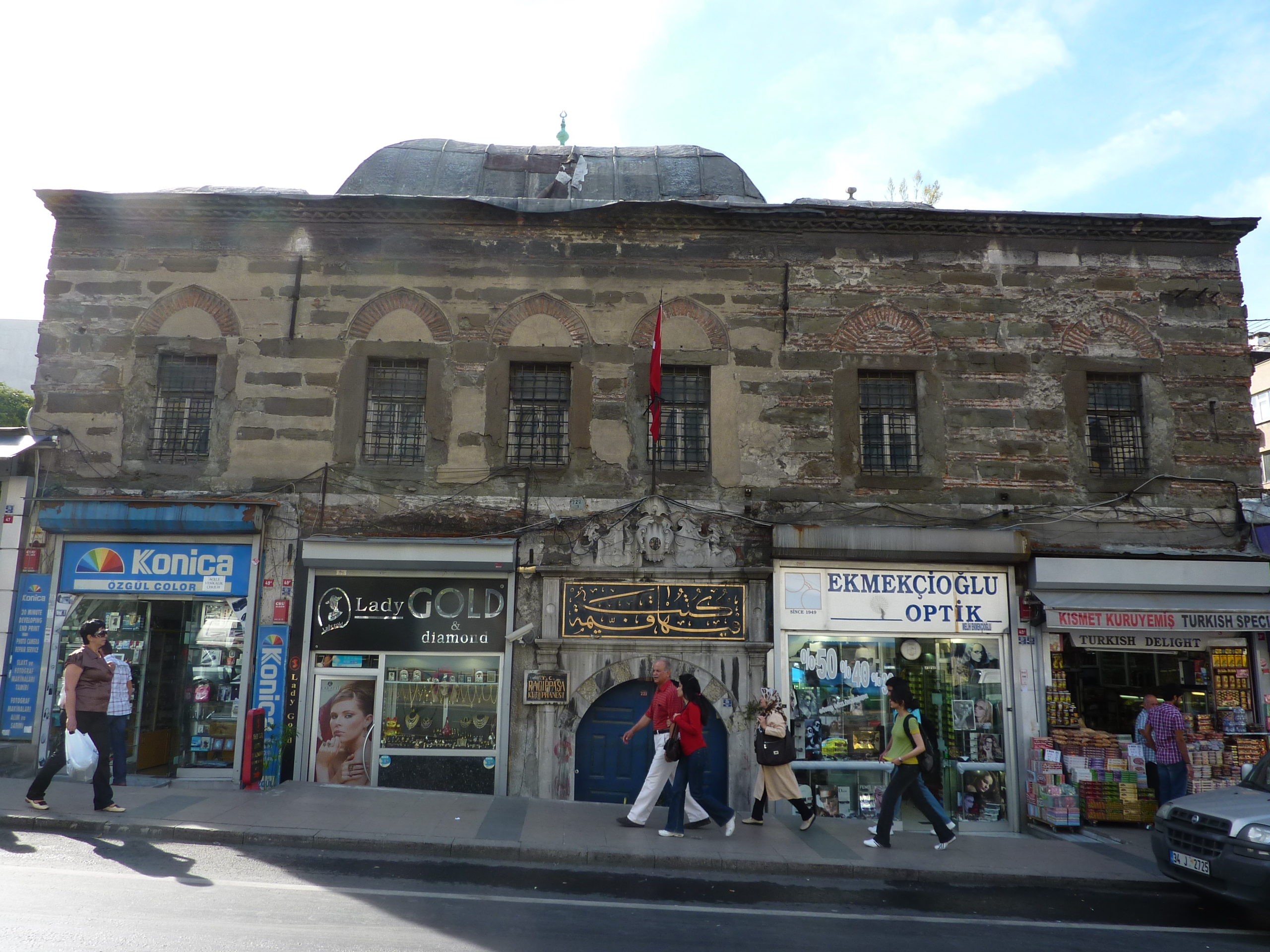 Ragıp Paşa Library (Ordu Cd., Istanbul)